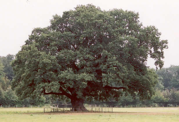 Zomereik op landgoed Hilverbeek te 's Graveland. Leeftijd ongeveer 300 jaar, stamomtrek 6,6 meter.